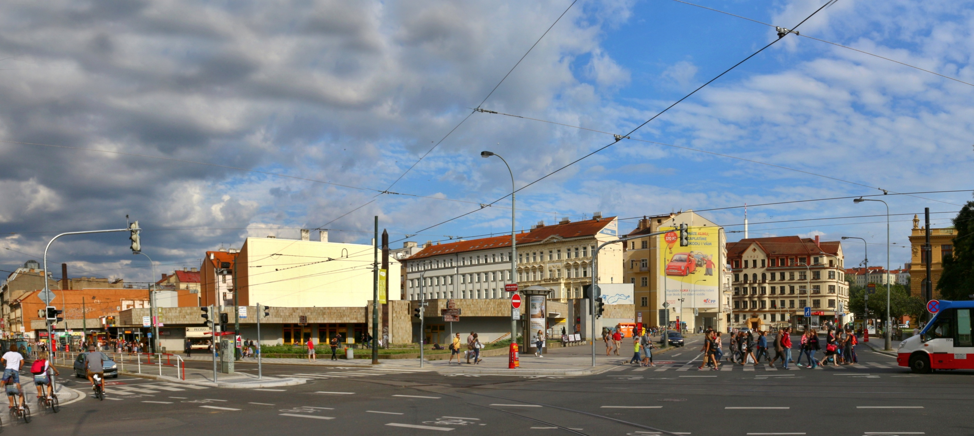 Praha Florenc